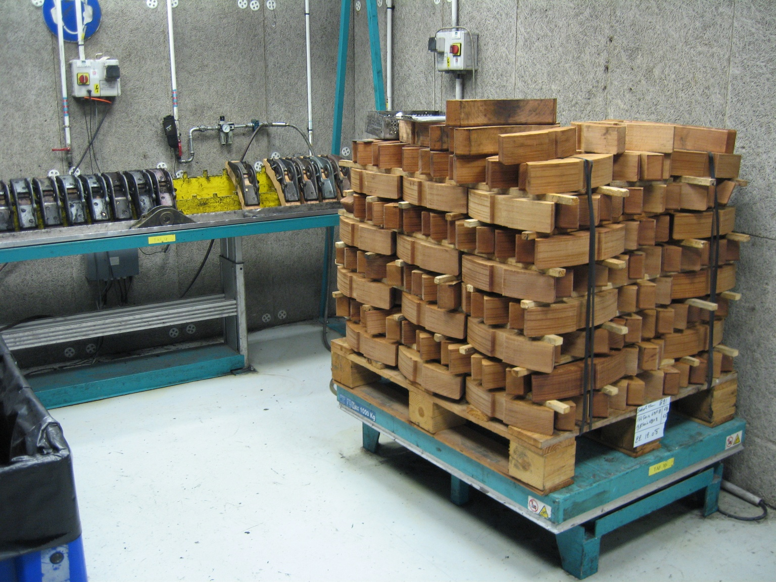 Sabots de freinage en bois à l'Atelier de Maintenance des Trains / JPO Ateliers de Saint-Ouen 06/06/2009.